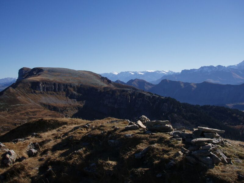 Blick vom Hohgant West nach Osten zur Steinigen Matte und zum Furggengütsch (Felsabsturz ganz links)